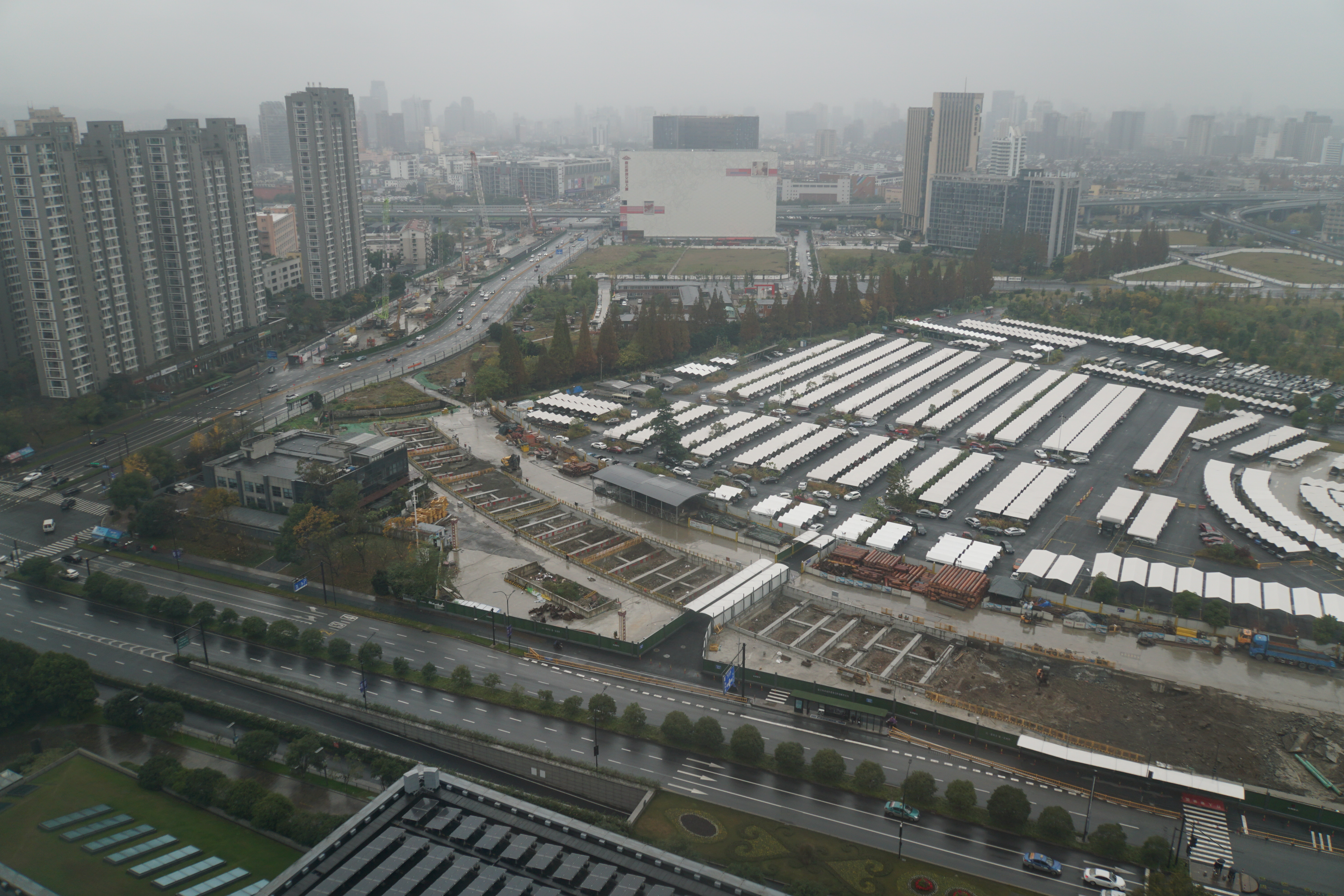 20181204四季青站与明挖区间